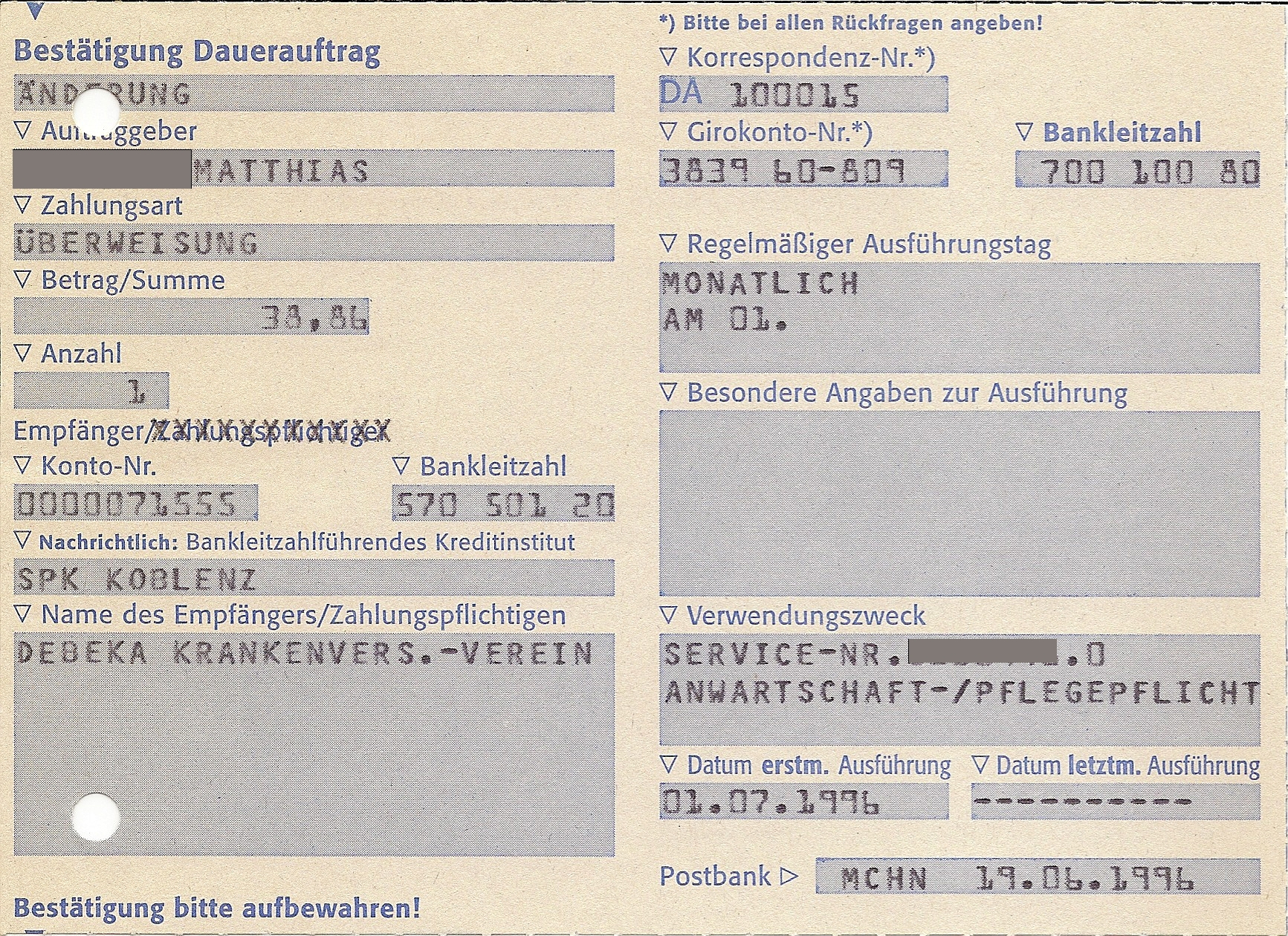 Bestätigung der Postbank für einen Dauerauftrag (Format A5)